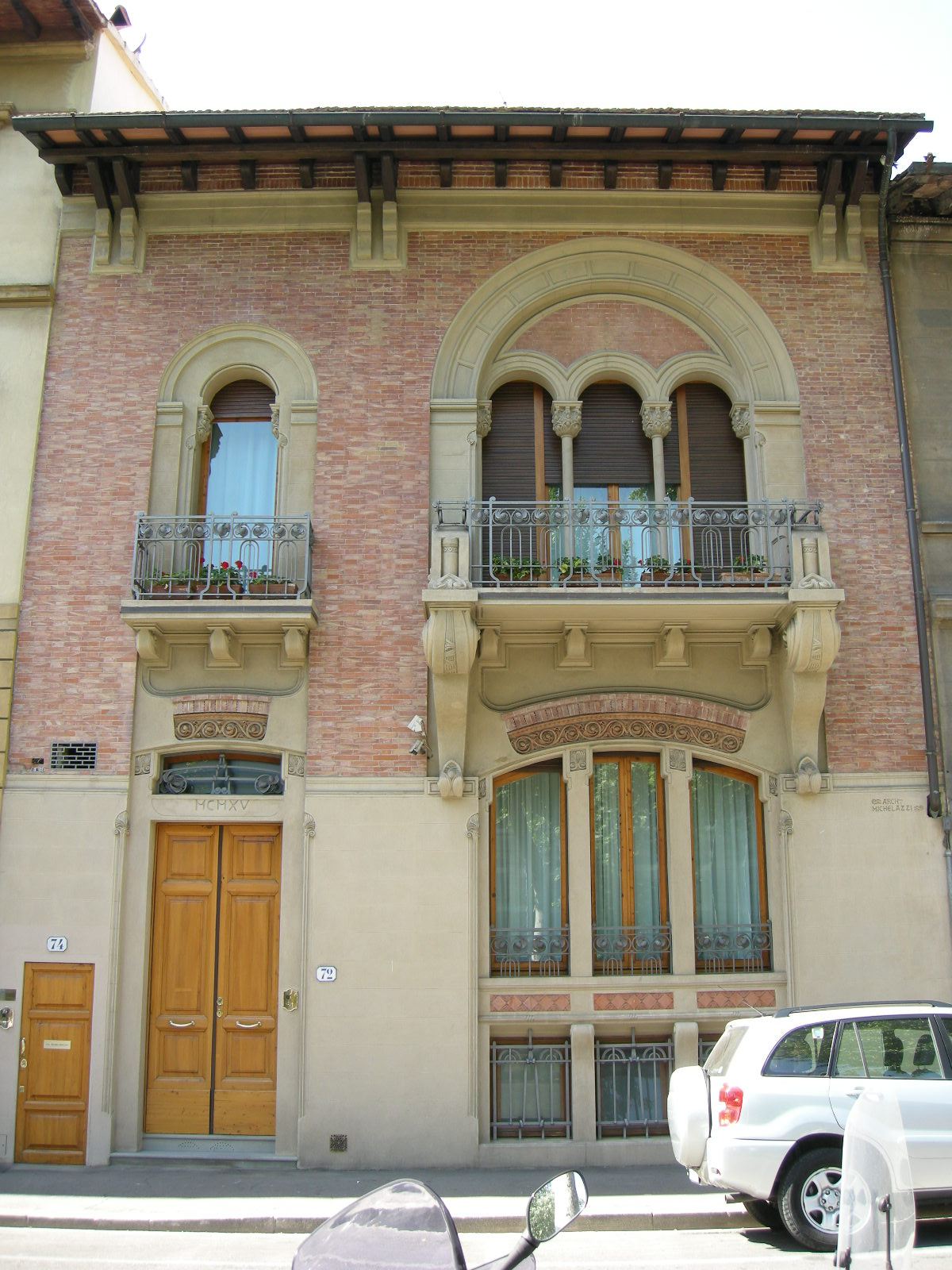 Villino Galeotti-Flori